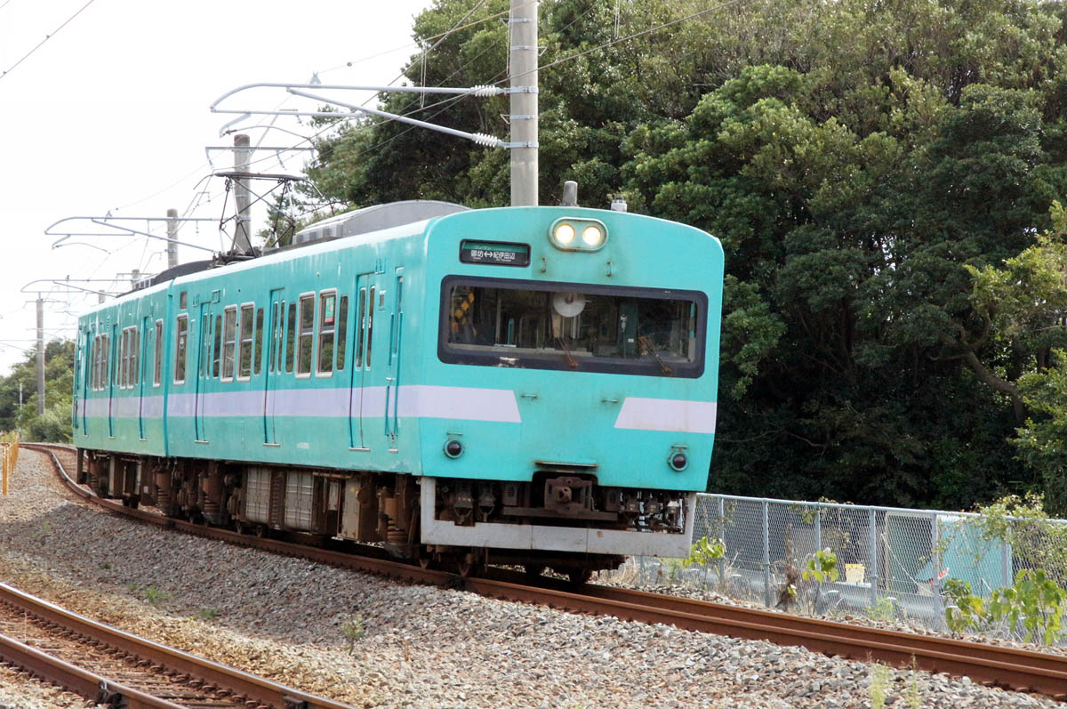 JR西日本113系2000番台